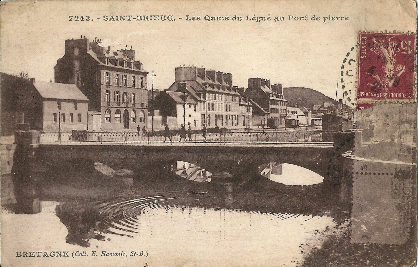 Saint-Brieuc (Côtes-du-Nord, France) , quais du Légué au Pont de pierre, vers 1920